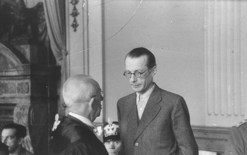 Volksgerichtshof, Graf Schwerin v.Schwanenfeld Berlin.- Volksgerichtshof, Prozeß nach dem 20. Juli 1944; Graf Schwerin von Schwanenfeld Abgebildete Personen: Schwerin von Schwanenfeld, Ulrich Wilh. Graf: Prozeß 20. Juli 1944, Deutschland